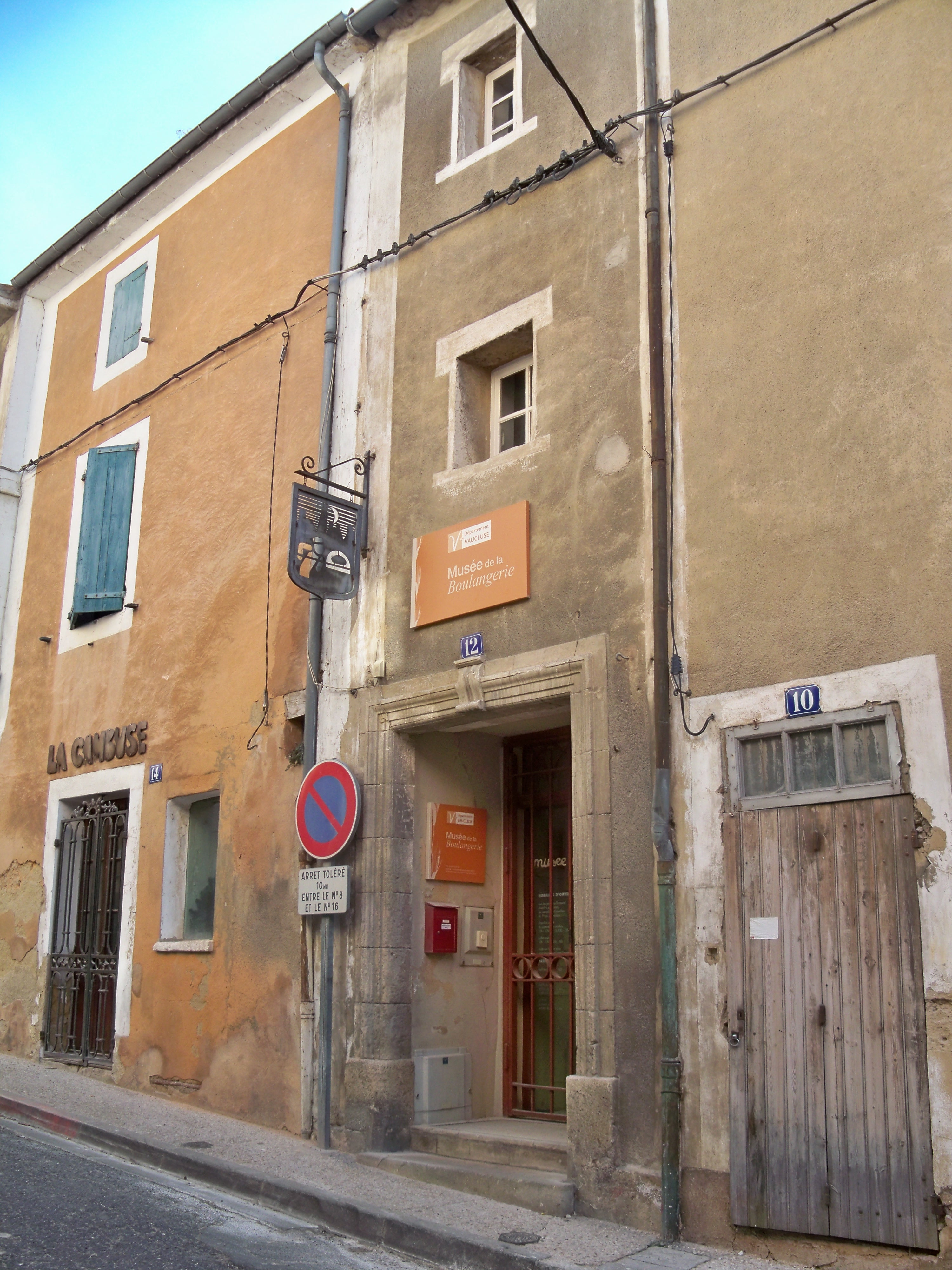 Musée de la boulangerie à Boannieux, Vaucluse, France